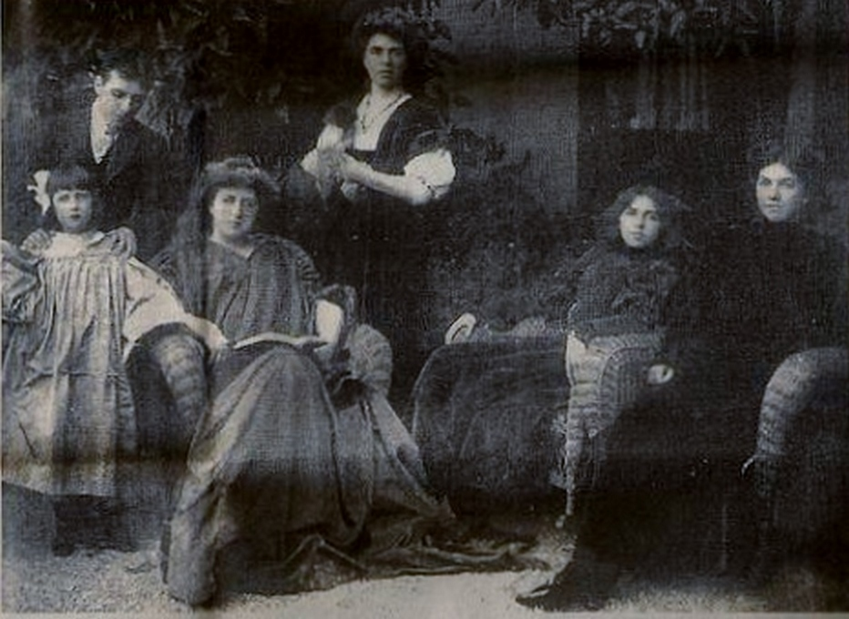 Luisa Lynch (sentada, a la izquierda), escritora feminista, con sus hijos: Wanda, Carlos, Carmen, Ximena y Paz Morla Lynch.